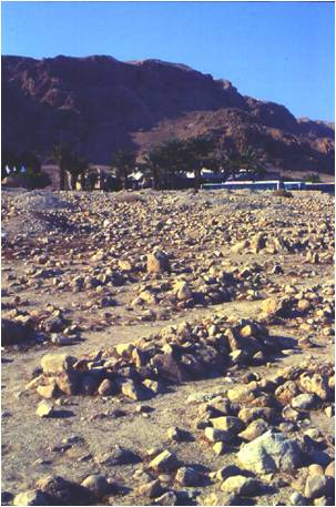 Tombe dans le cimetière de Qumrân. Dans la Palestine antique, la majorité des Juifs se faisait enterrer dans une fosse recouverte de cailloux et une pierre plus grosse indiquant l’emplacement de la tête ou des pieds du défunt.